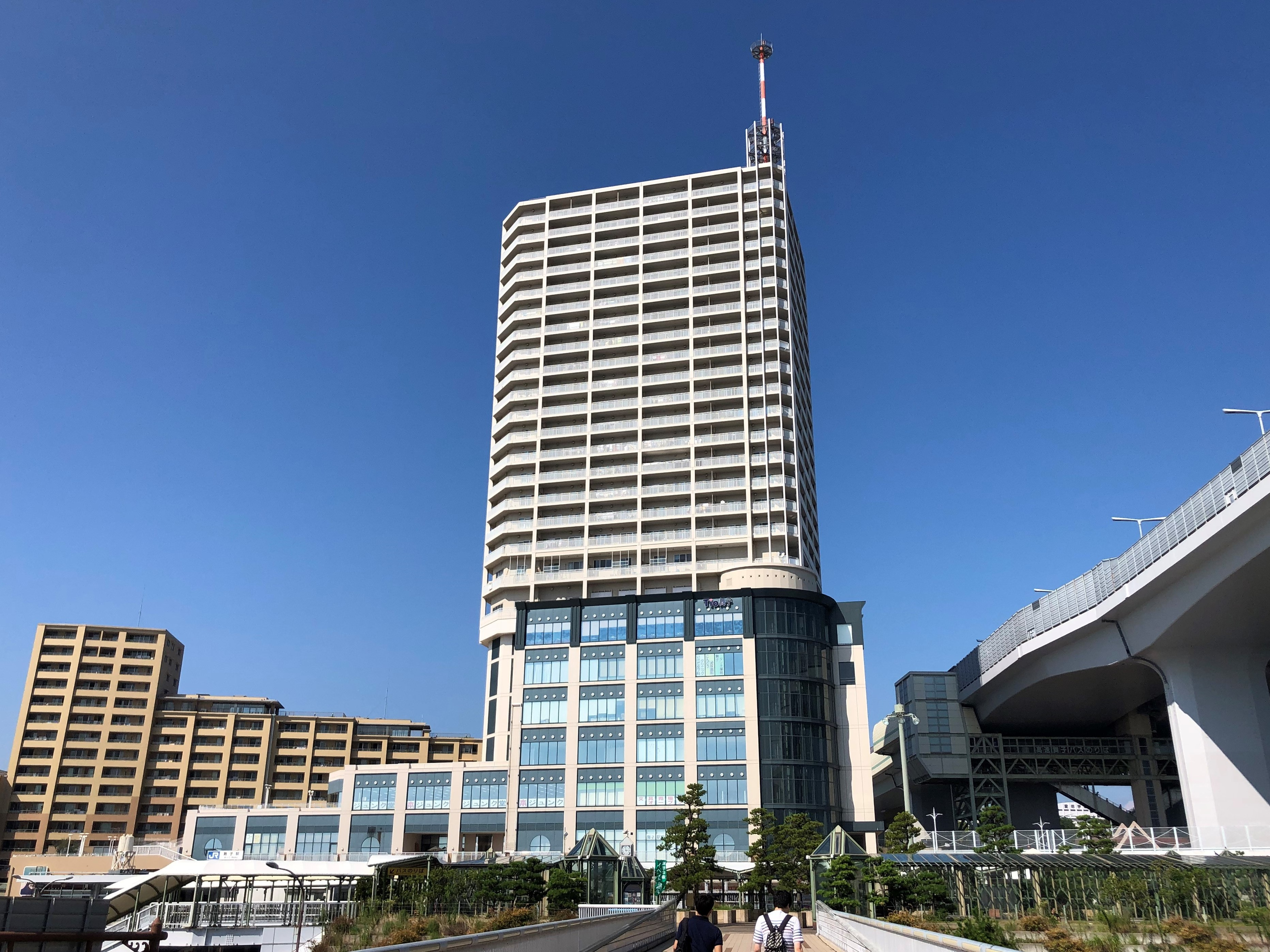 Tio舞子